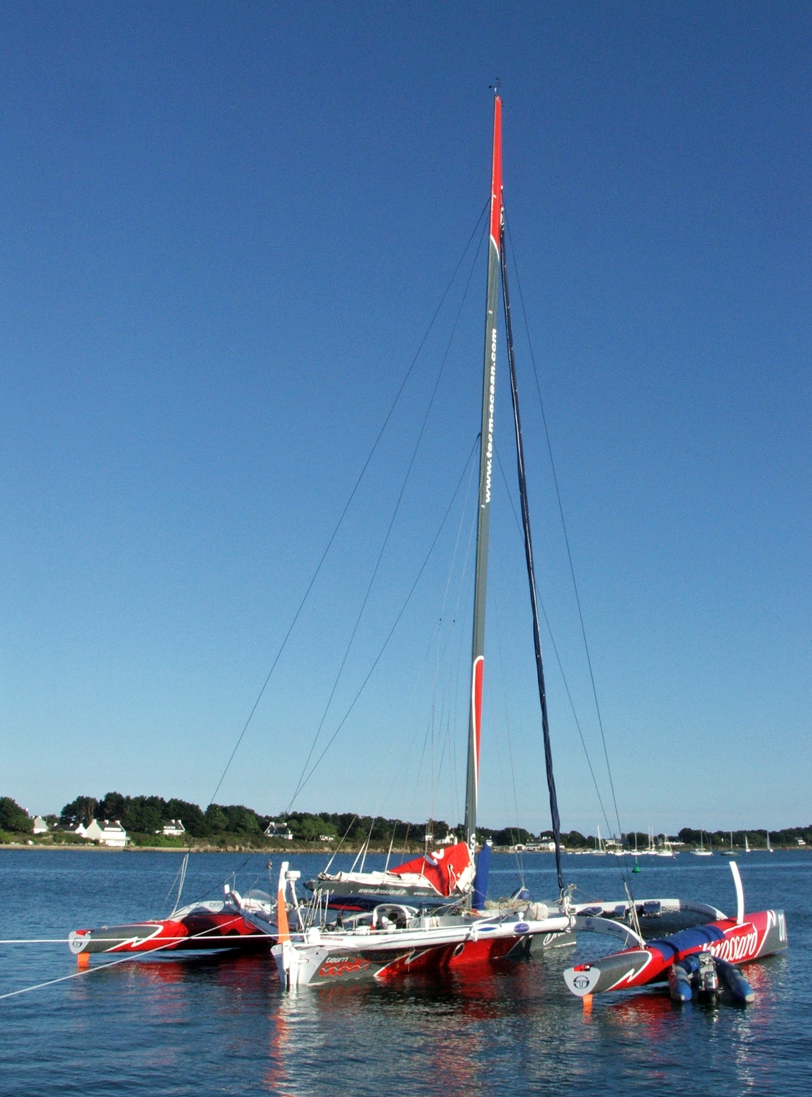 Port de La Trinité, Bretagne, France.